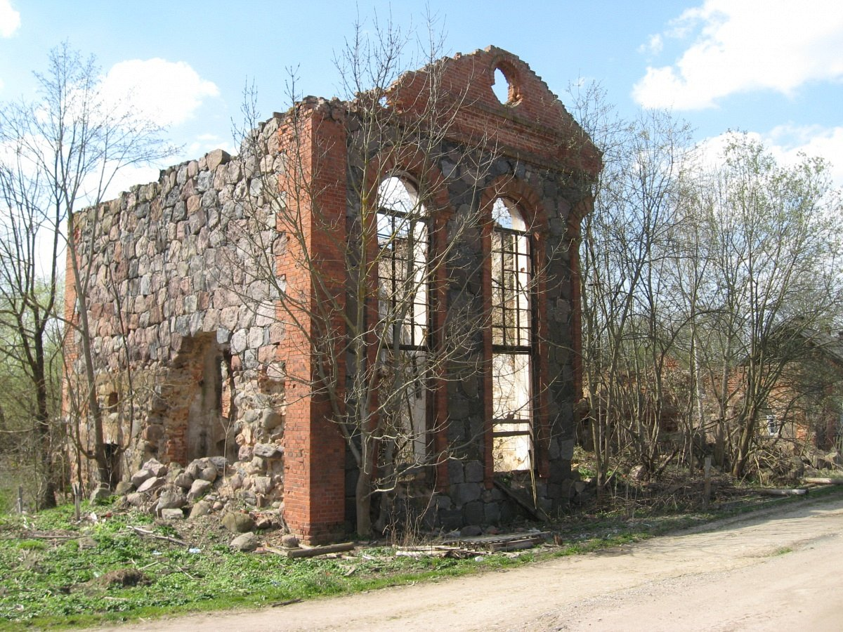 Абадоўцы. Вінакурня